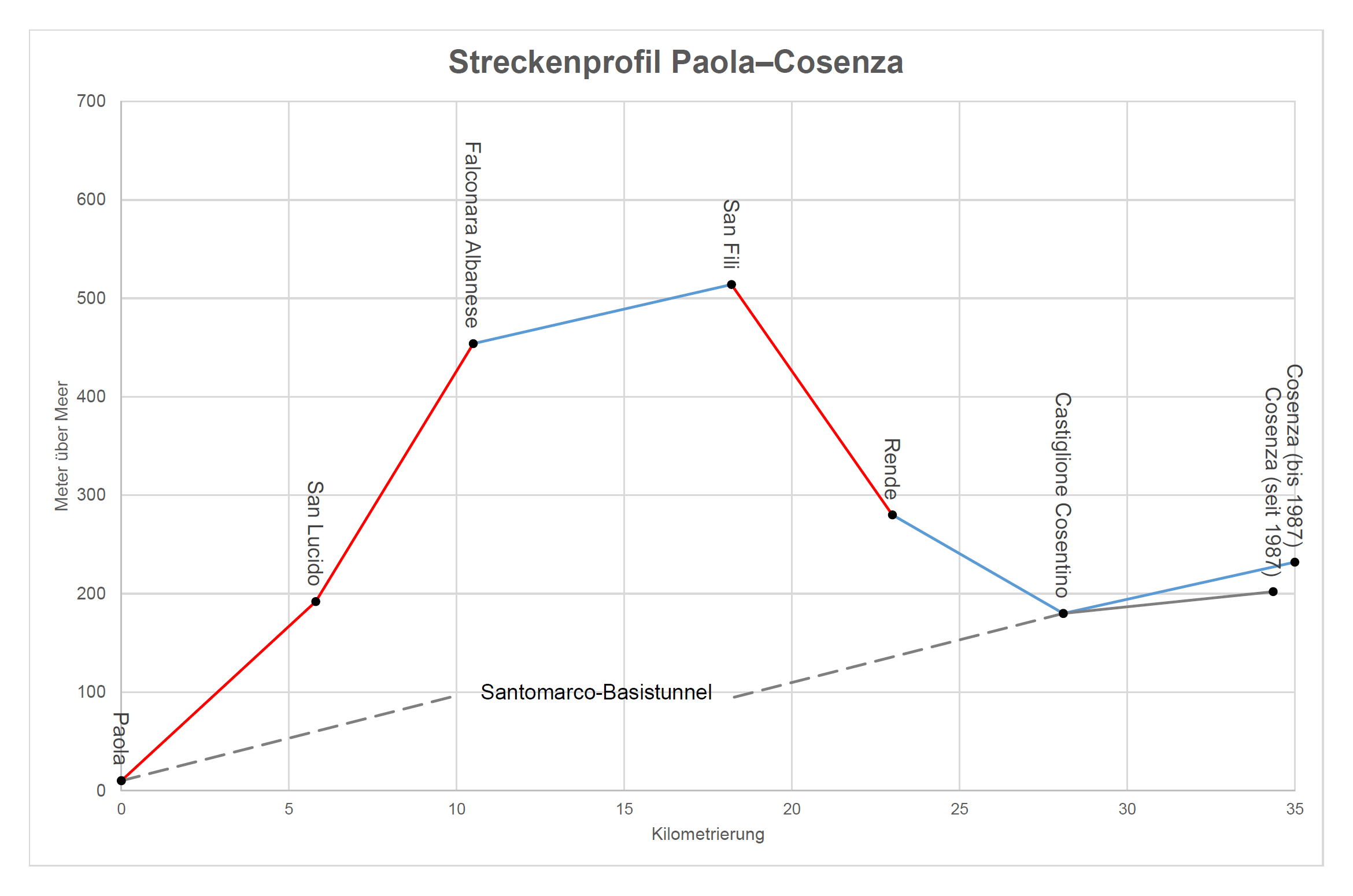 Streckenprofil Paola–Cosenza